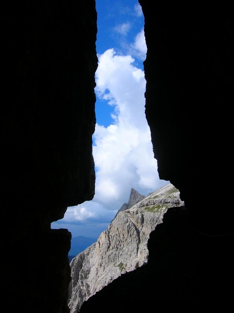 Strada degli alpini